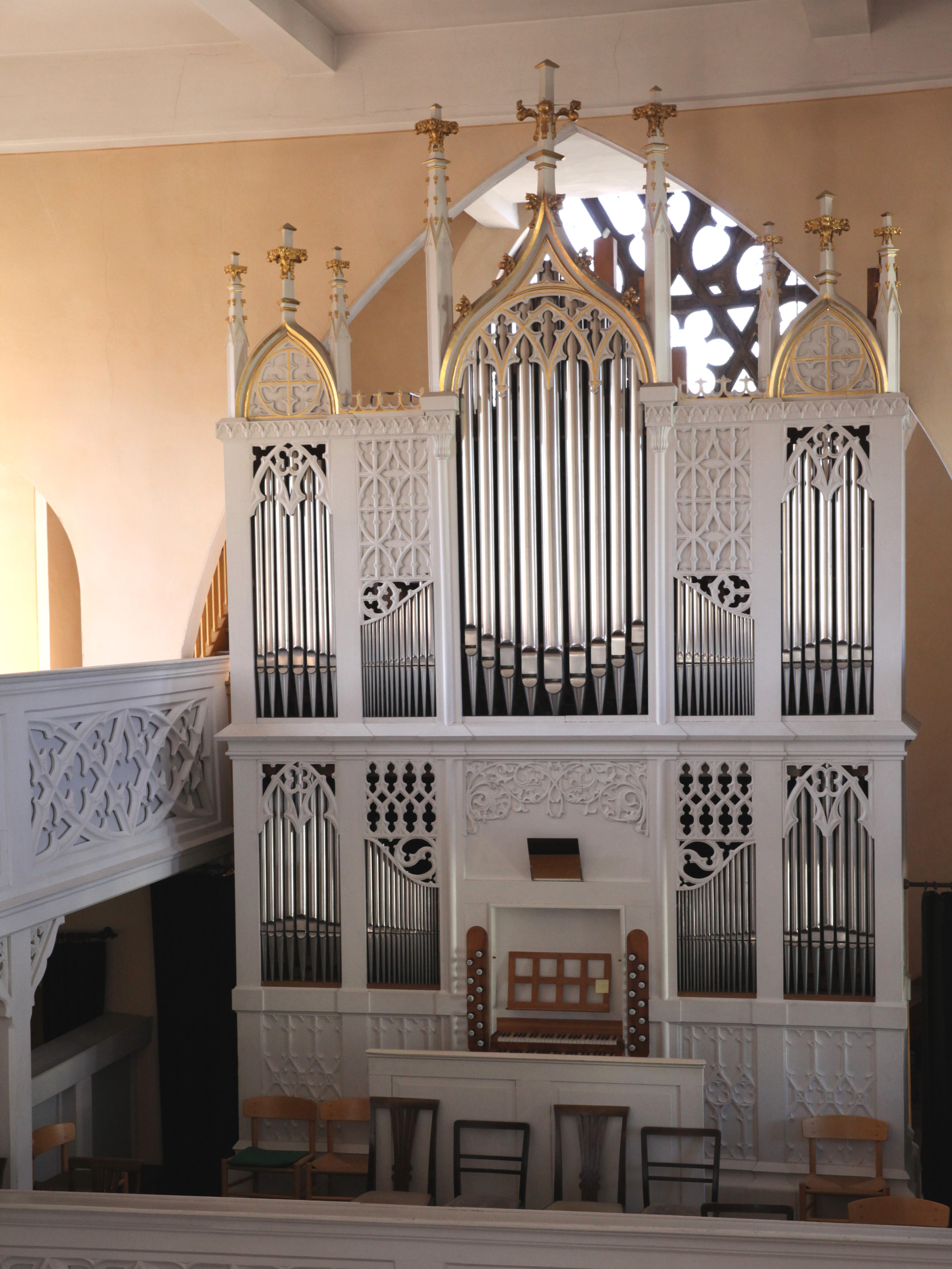 Orgel, Klosterkirche in Sonnefeld, Landkreis Coburg